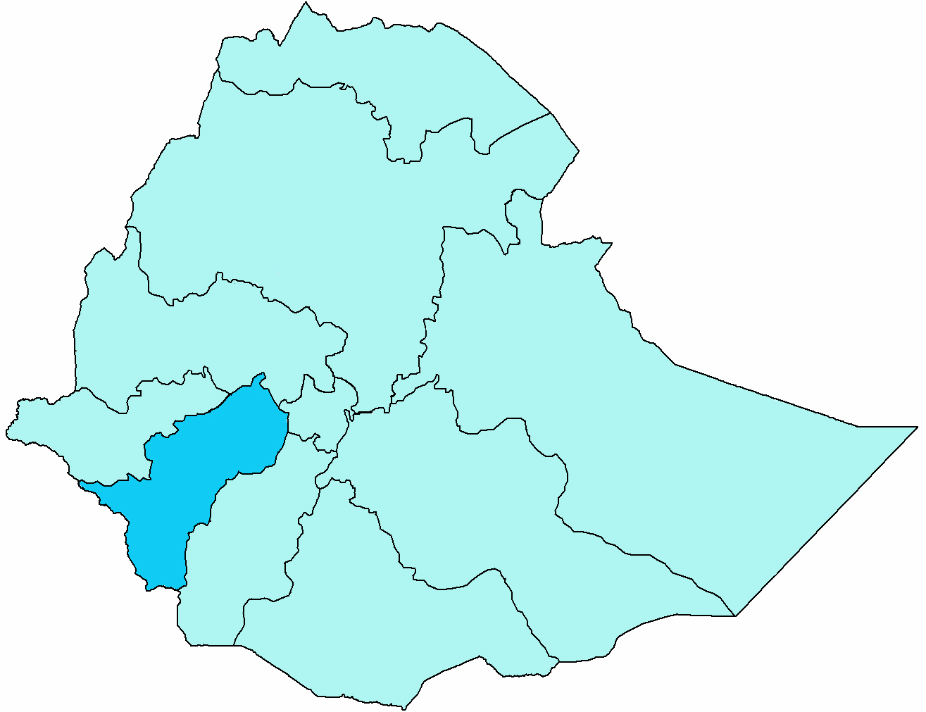 Mappa del vicariato apostolico di Jimma-Bonga. Fonte per i confini della diocesi: Ethiopian Catholic Church.